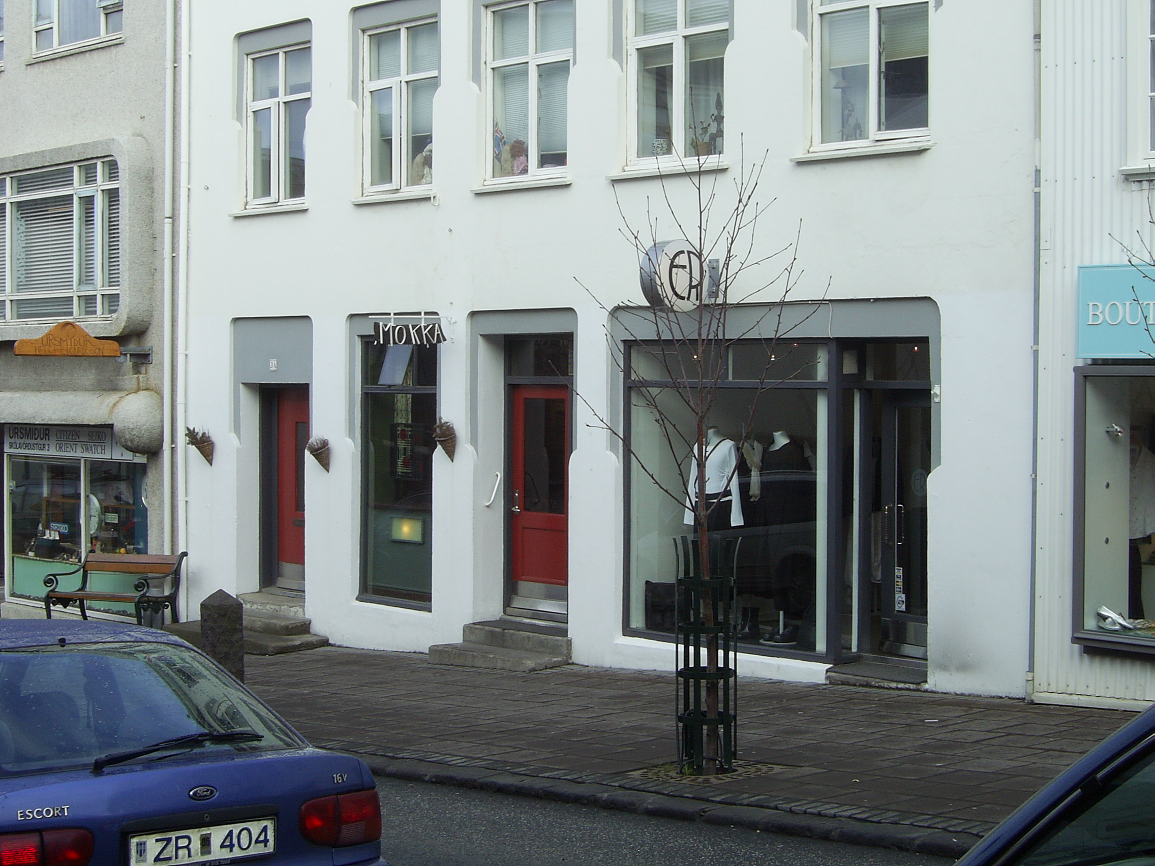 Mokka Kaffi, Reykjavík, Iceland